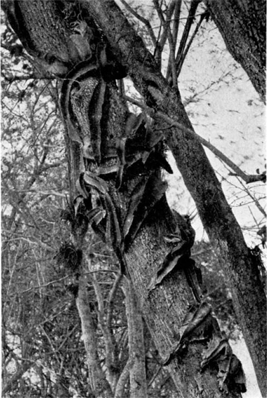 Strophocactus testudo (Hylocereeae; Cactaceae; Planta) Nathaniel Lord Britton és Joseph Nelson Rose "The Cactaceae" c. könyvéből Deamia testudo néven, eredeti élőhelyén